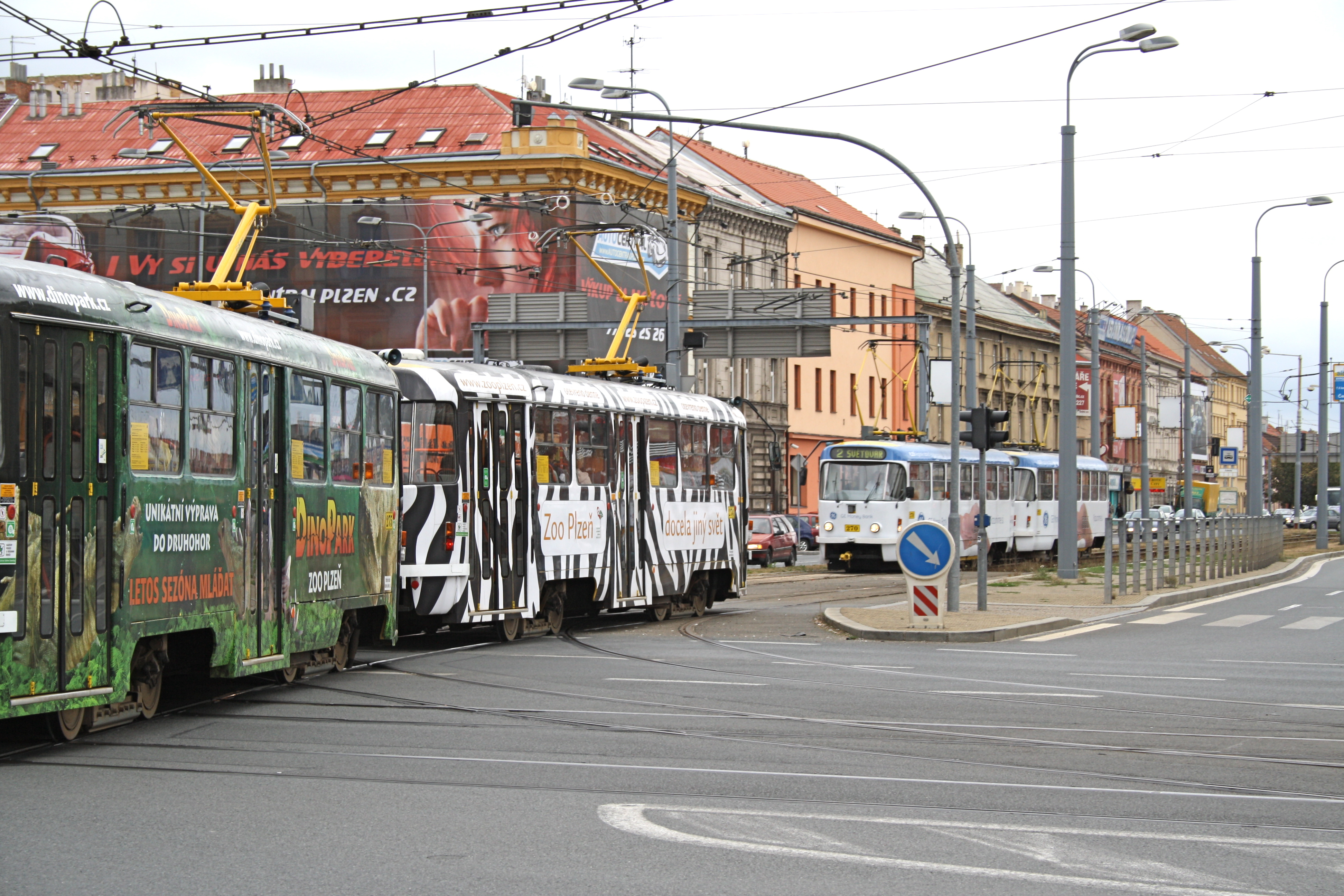 Tatra T3P in Pilsen